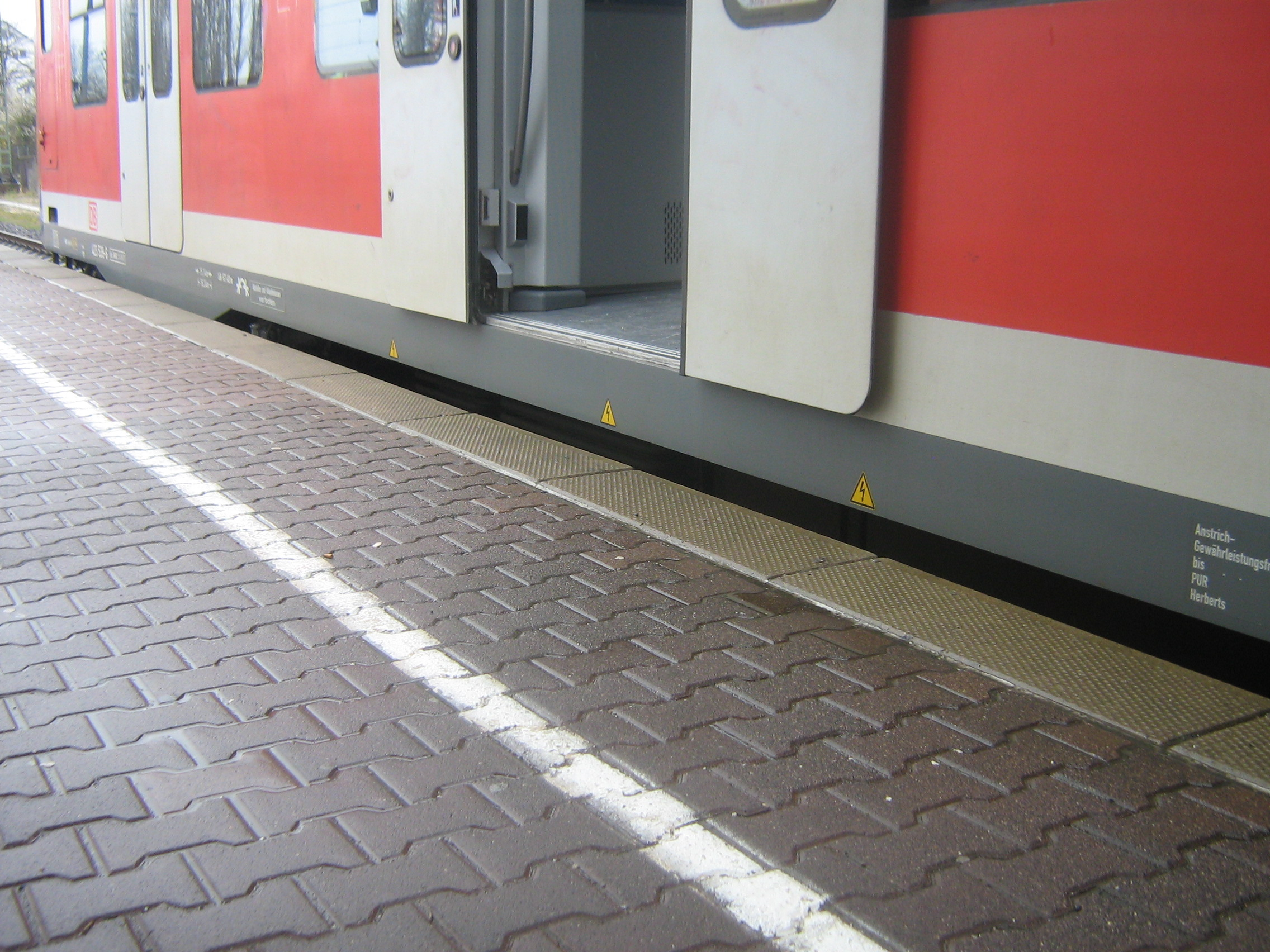 Nicht behindertengerechter Einstieg in die S-Bahn